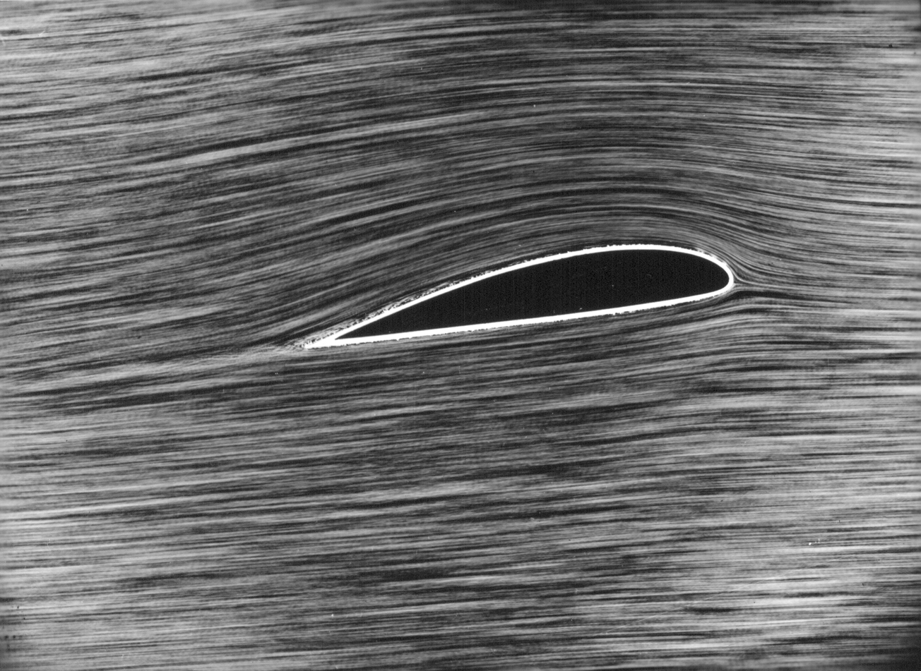 Sichbarmachen von Strömungen im Wasserkanal, Strömung um Profile bei verschiedenen Anstellwinkeln: glatter Abfluss an der Hinterkante.